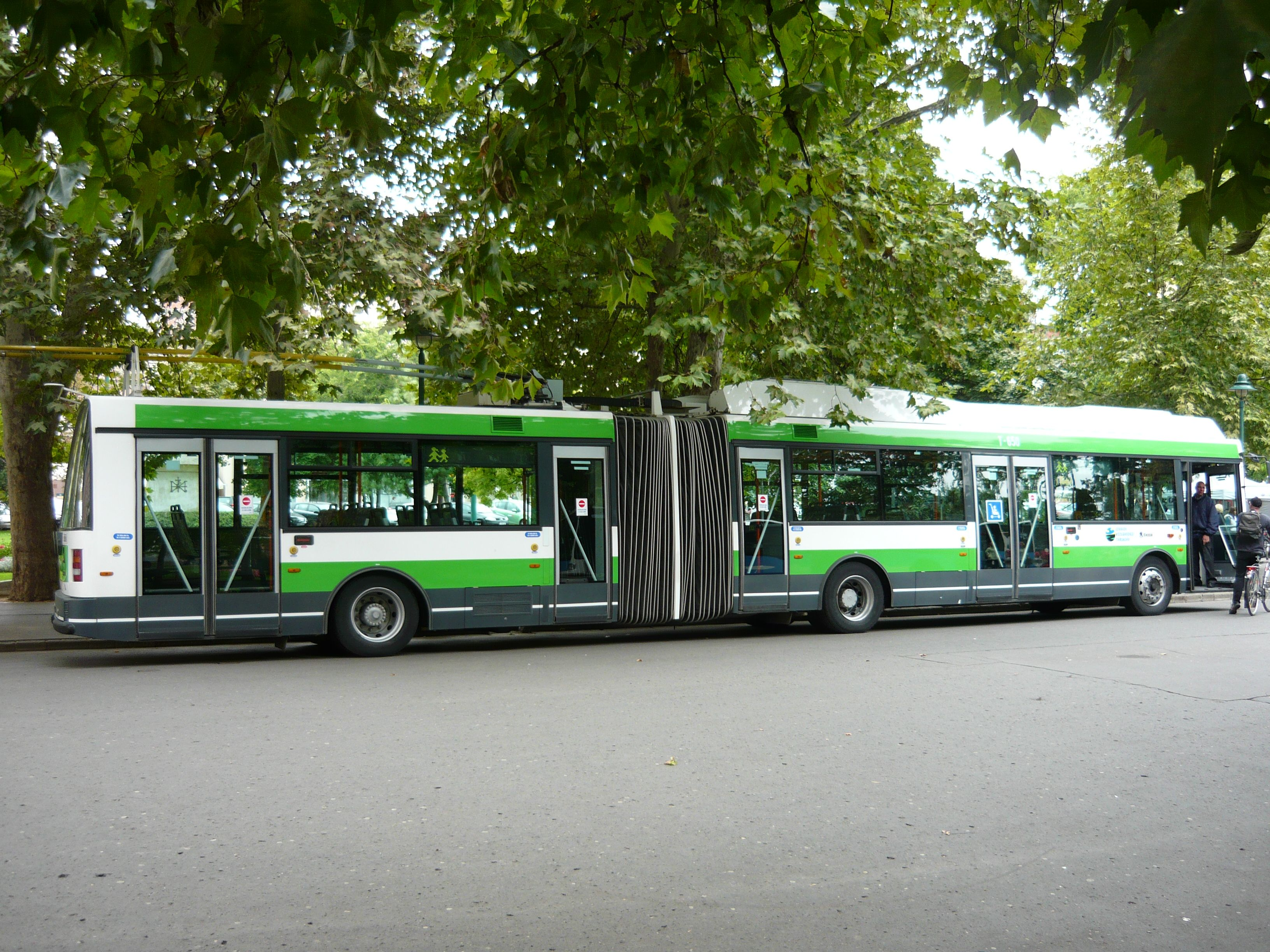 Škoda 22Tr, Szeged, Széchenyi tér